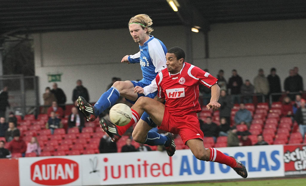 Felix Bably vom S.C. Fortuna Köln beim Spiel gegen Westfalia Herne im Südstadion Köln